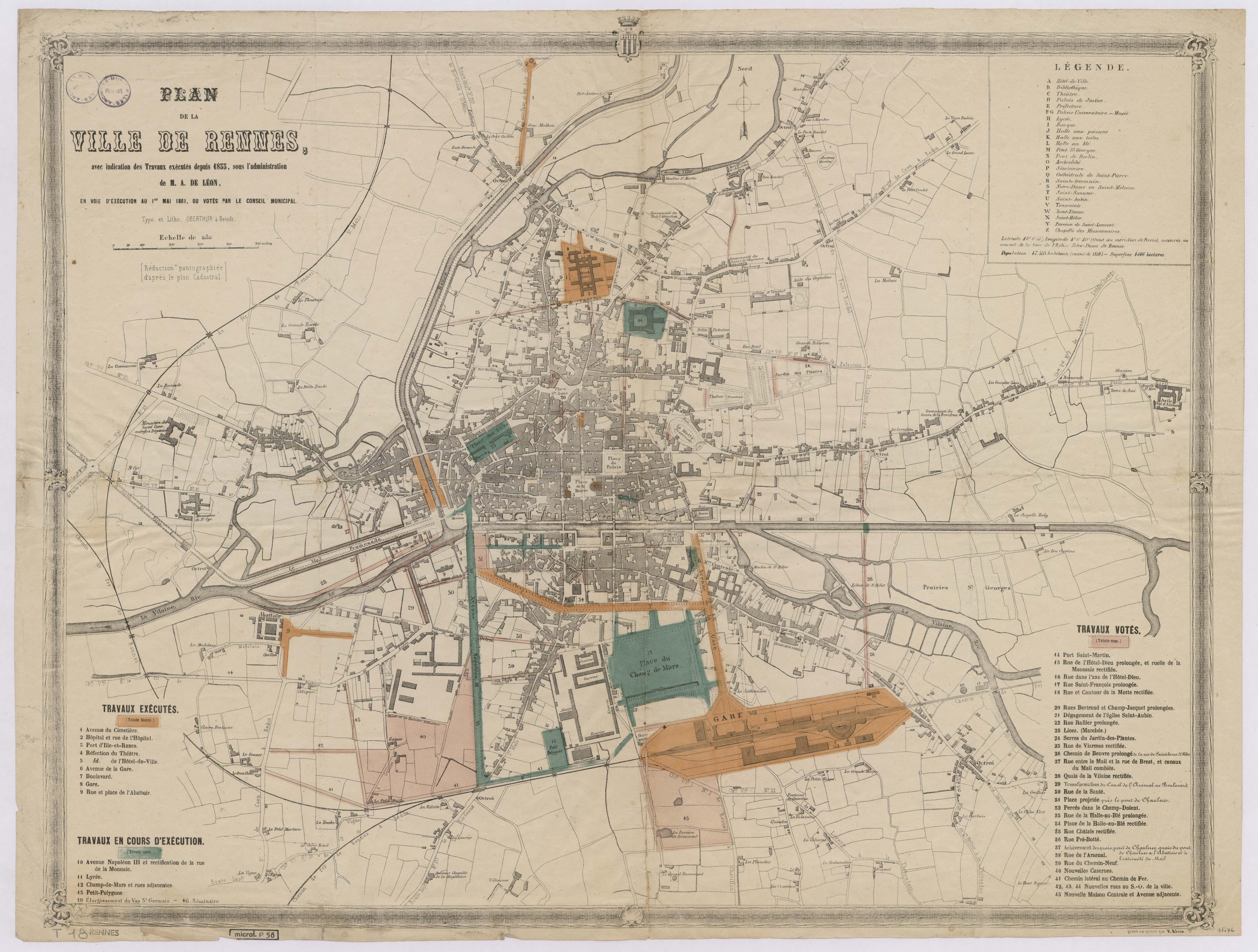 Plan de la ville de Rennes avec indication des travaux exécutés depuis 1855, sous l'administration du maire Ange de Léon, en voie d'exécution au 1er mai 1861, ou votés par le conseil municipal. Archives municipale de Rennes, 1 Fi 76